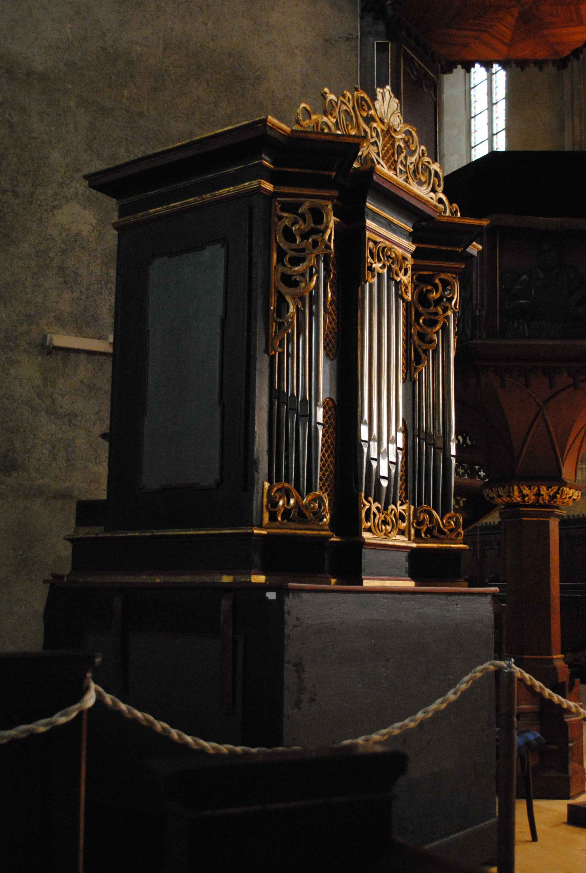 Biserica parohială evanghelică "Sf. Maria" 1350 - 1520,1445